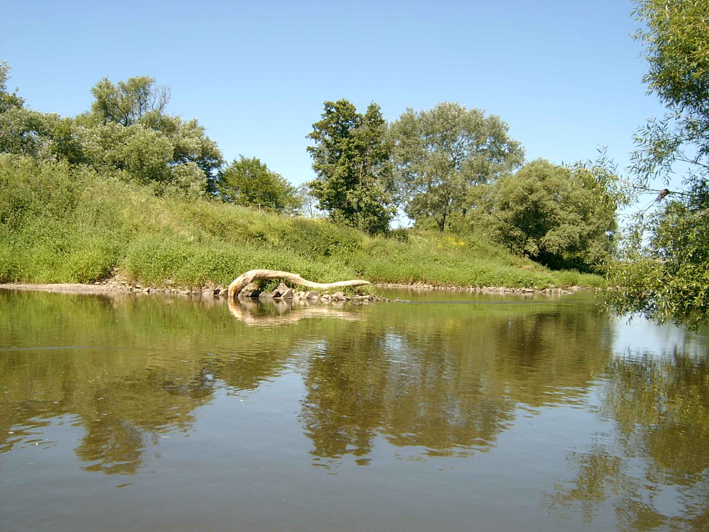 Die Lahn zwischen Gießen und Wetzlar.